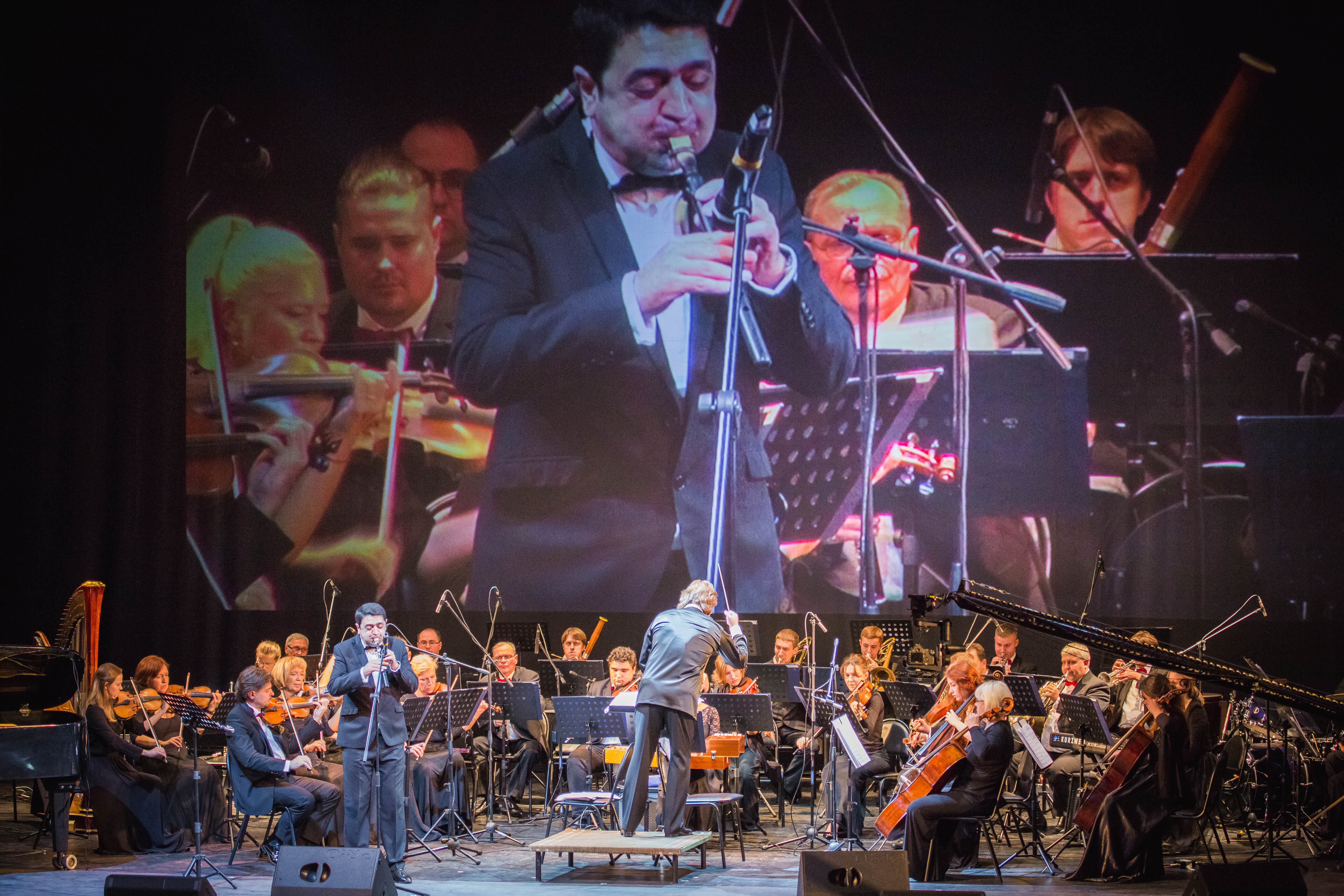 Նորայր Բարսեղյանը և «Բոյան» նվագախումբը Դուդուկի մոսկովյան միջազգային 3-րդ փառատոնին, 2016 թվականի սեպտեմբերի 25, Մոսկվա